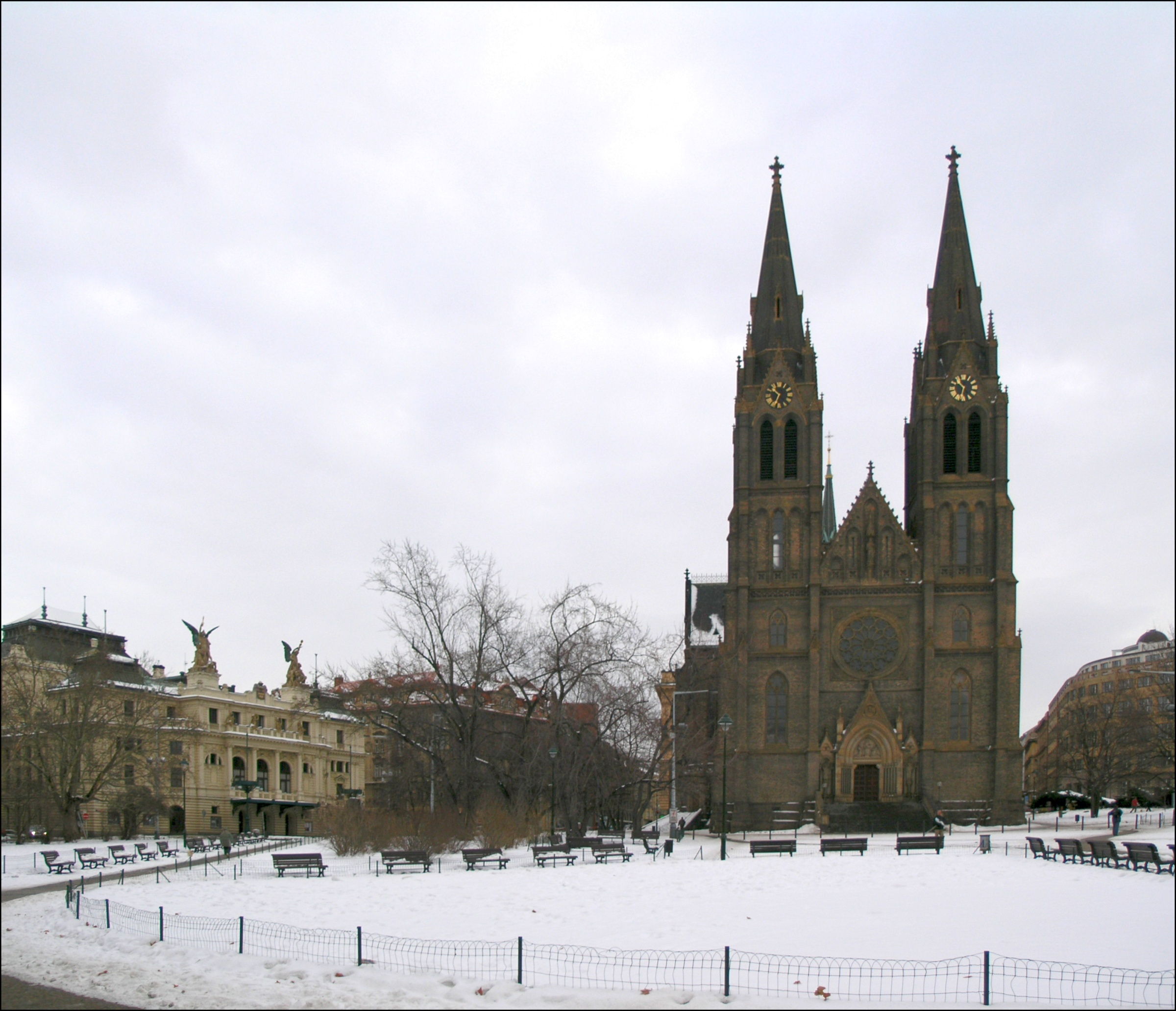 Chrám sv. Ludmily v Praze